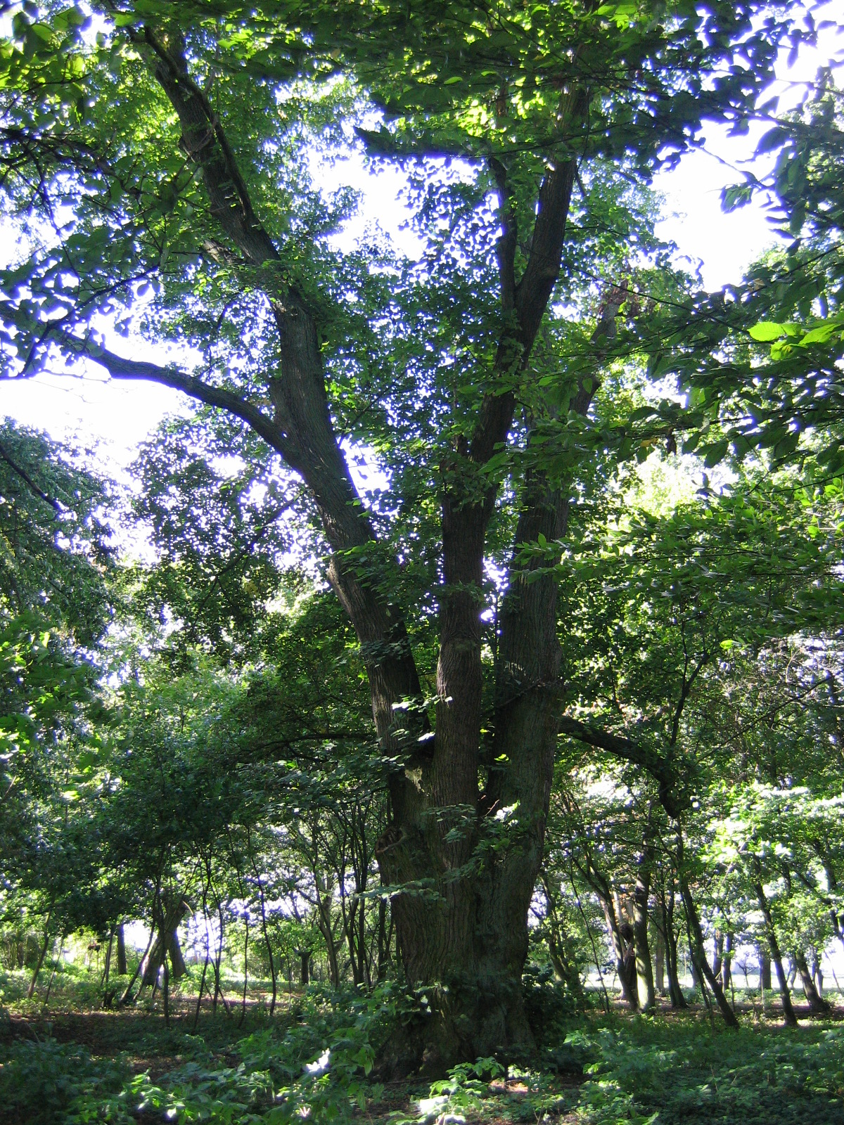 Lipa drobnolistna, obwód 460 cm - pomnik przyrody, Młodojewo - park, (foto. Marcin Majdecki)